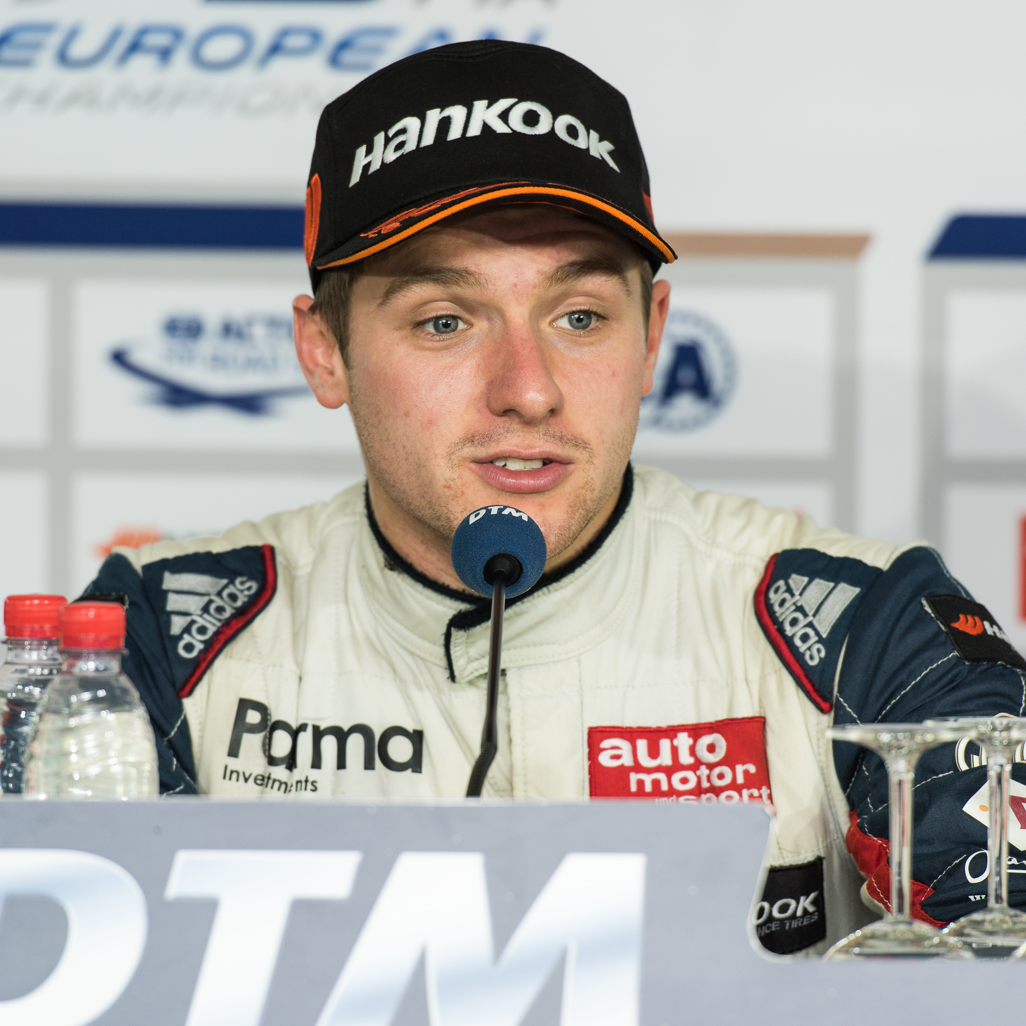 Carlin,DTM,Deutsche Tourenwagen Masters,F3 FIA European Championship,FIA Formel 3 Europameisterschaft,Hockenheimring,Jordan King,Motorsport,Pressekonferenz